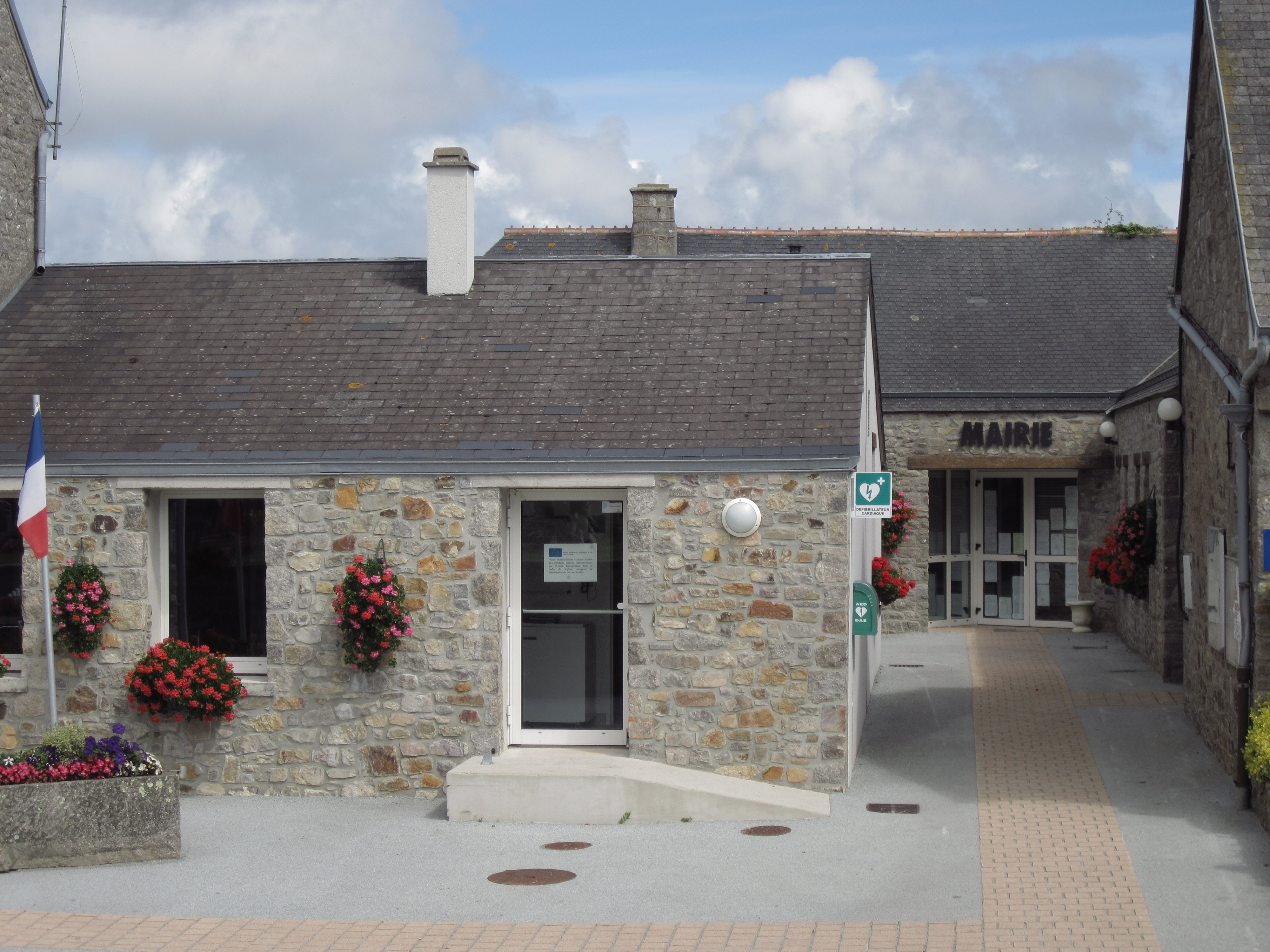 Saint-Germain-le-Gaillard (Manche)